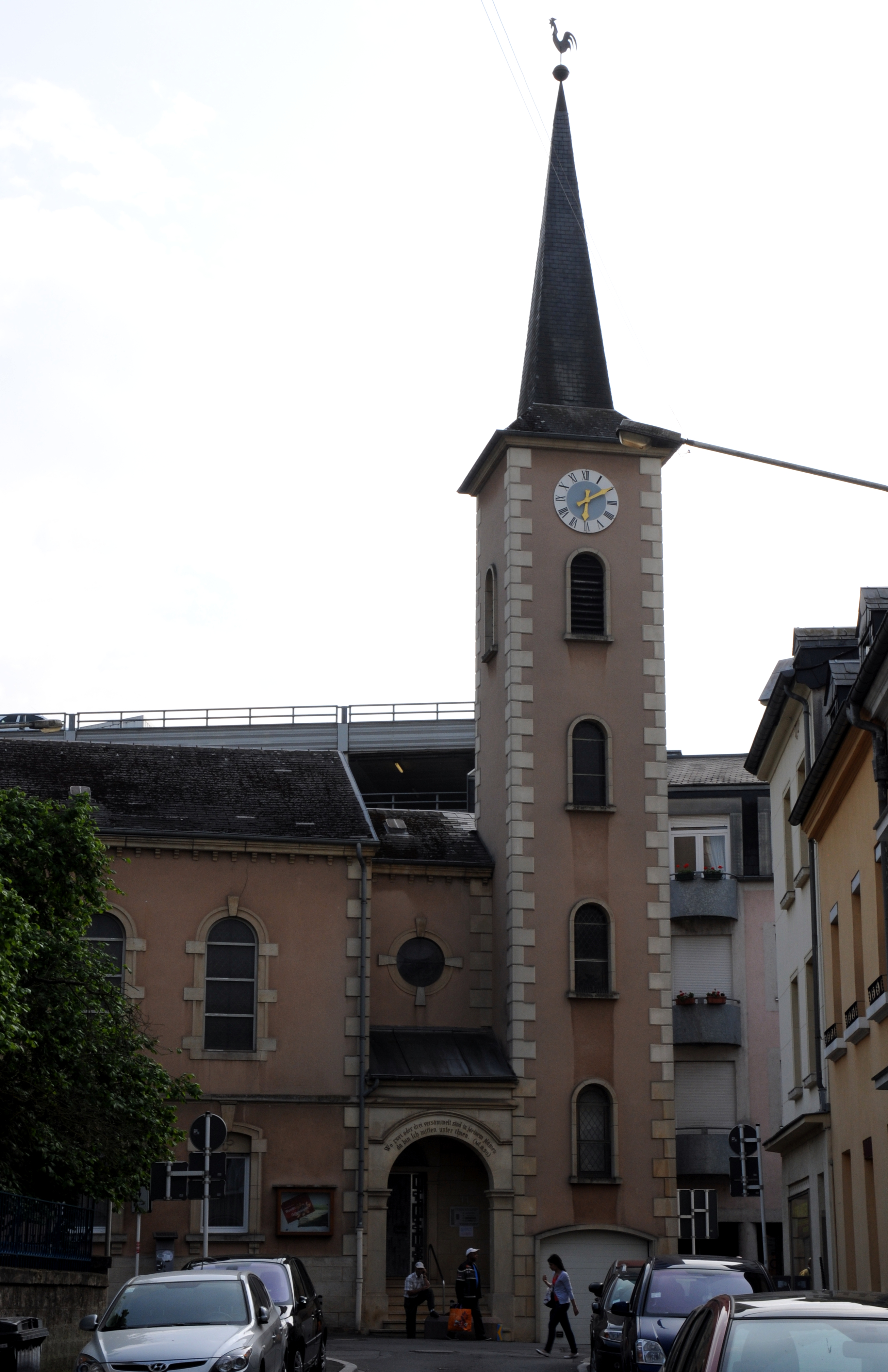 D'Protestantesch Kierch an der Liberatiounsstrooss zu Esch.